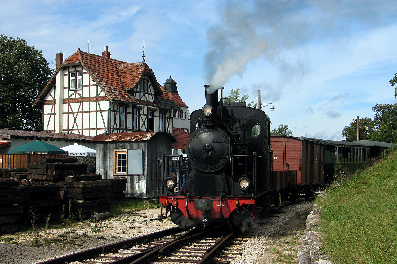 Lok 12 der Härtsfeld-Museumsbahn steht abfahrbereit am Museumsbahnsteig in Neresheim. Im Hintergrund das Bahnhofsgebäude, welches das Museum beherbergt.